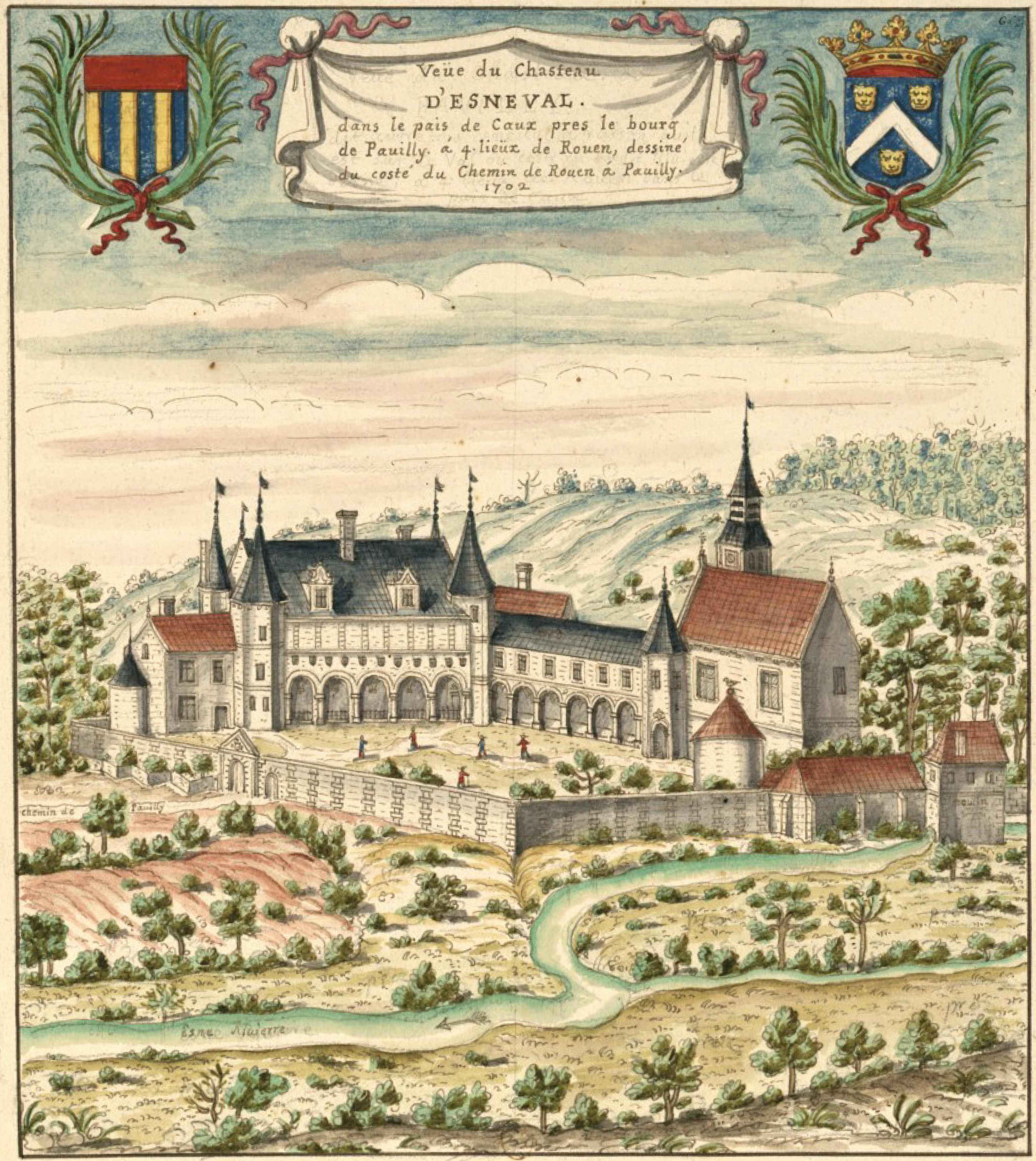 Veüe du chasteau d'Esneval, dans le pais de Caux pres le bourg de Pavilly, à 4 lieües de Rouen, dessiné du costé du Chemin de Rouen à Pavilly